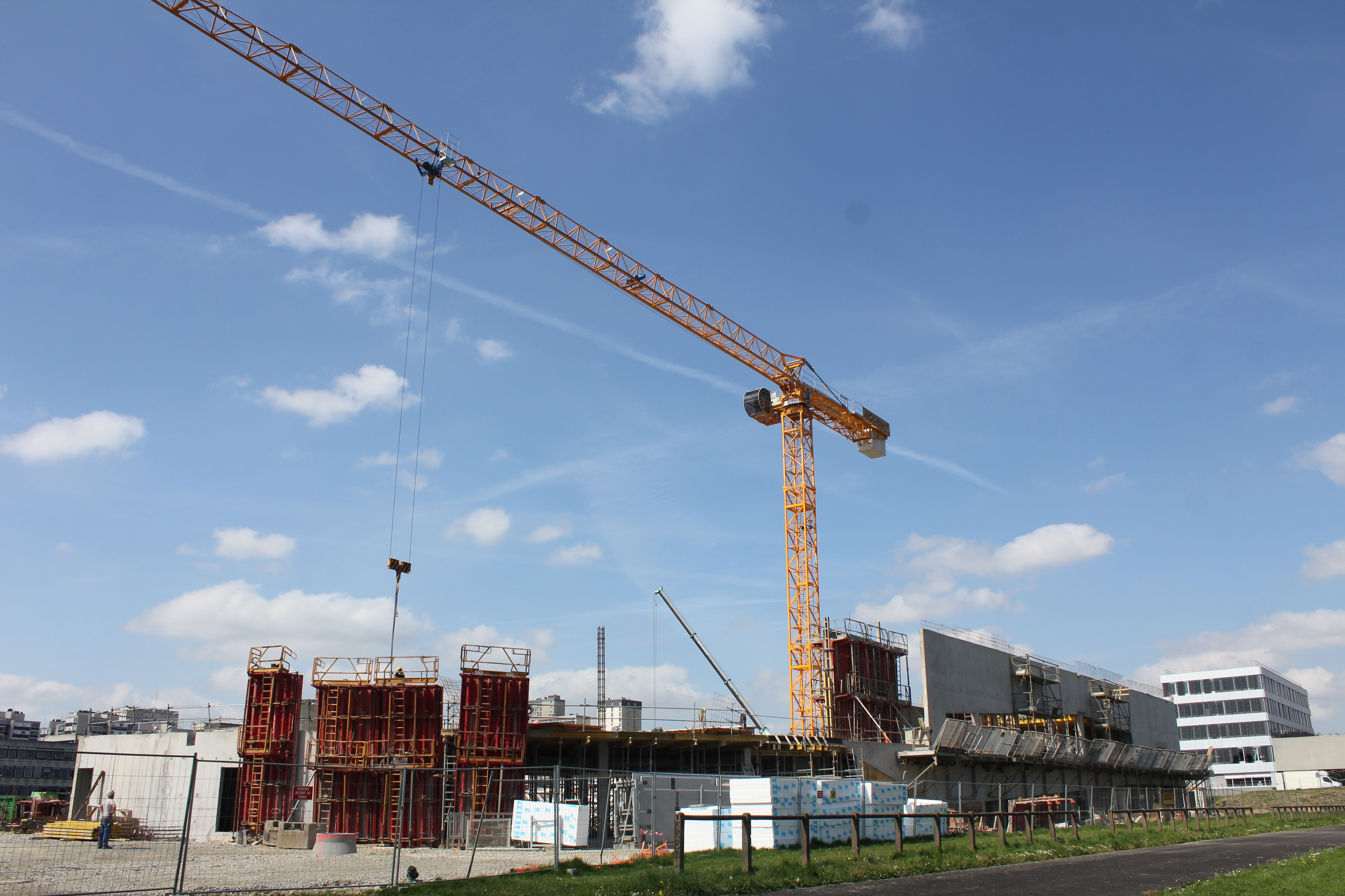 Stade Robert-Poirier en construction sur le campus de Villejean à Rennes, en avril 2014.